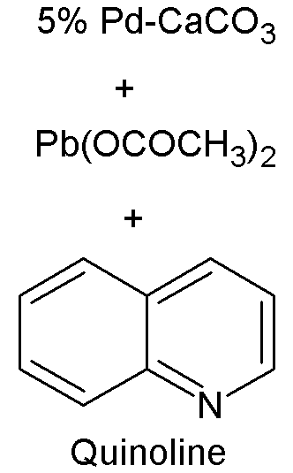 Lindlar Catalyst (eng)